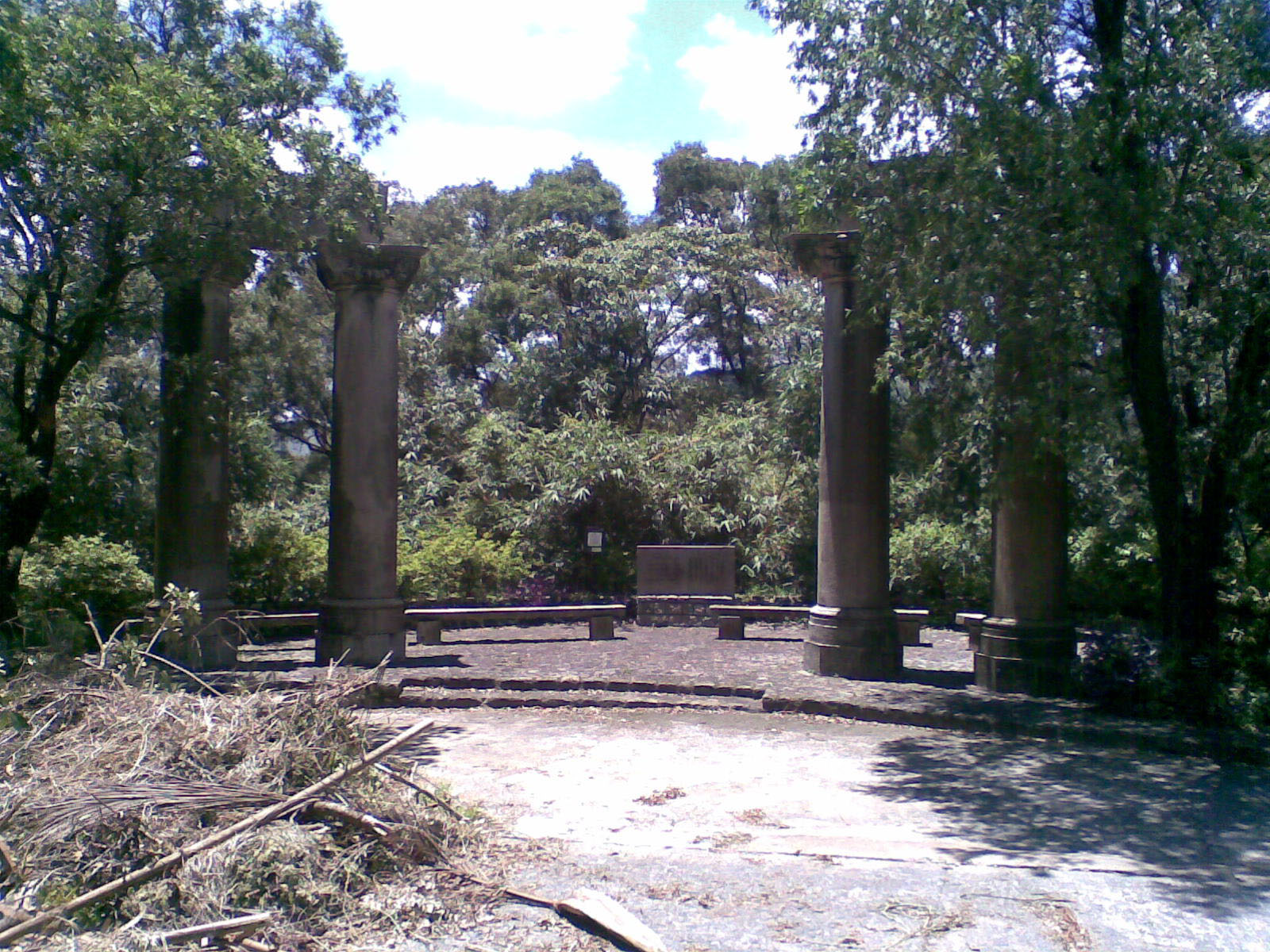 中文（香港）: 嘉道理農場暨植物園四柱擎天